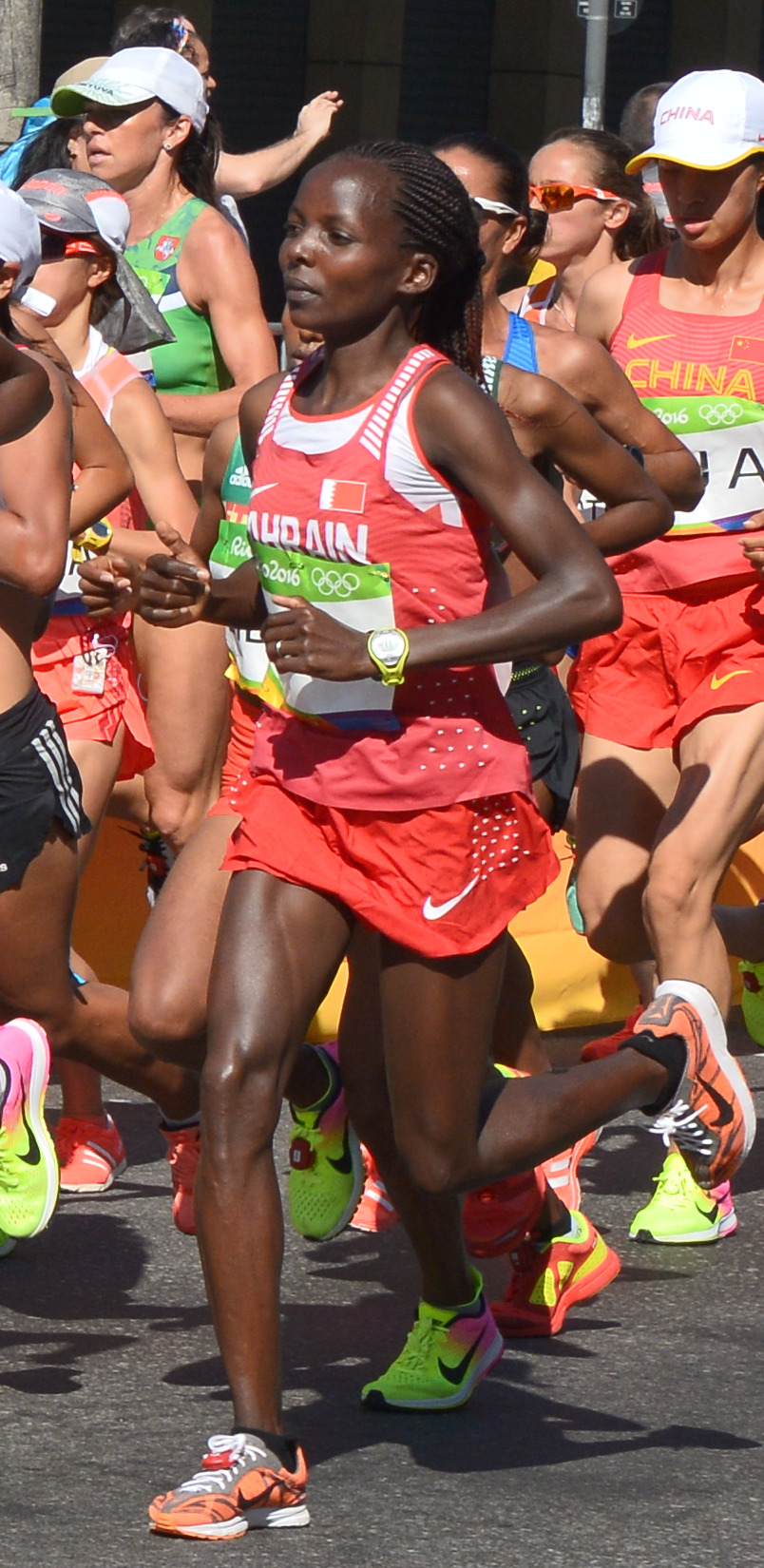 Passage du marathon des jeux olympiques de Rio 2016 dans le centre de Rio